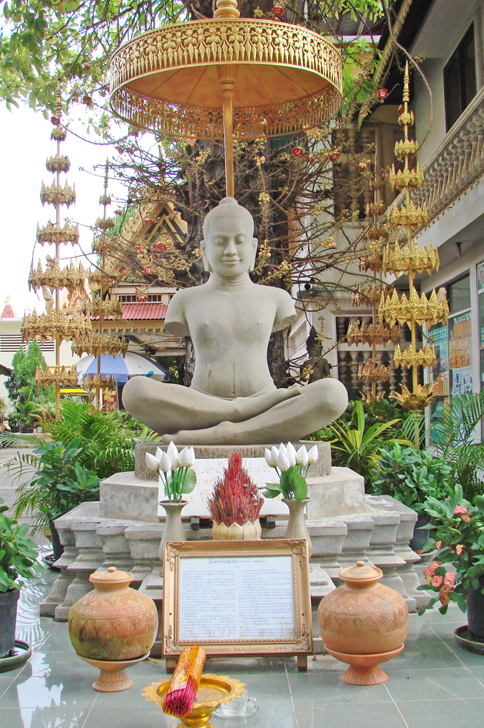 Moulage de la célèbre statue de Jayavarman VII dans la cour du Palais royal L'original est exposé dans le musée national du Cambodge Provenance de l'original : Krol Romeas, Angkor Thom, Siem Reap fin du XIIè siècle-début XIIIè siècle grès gris